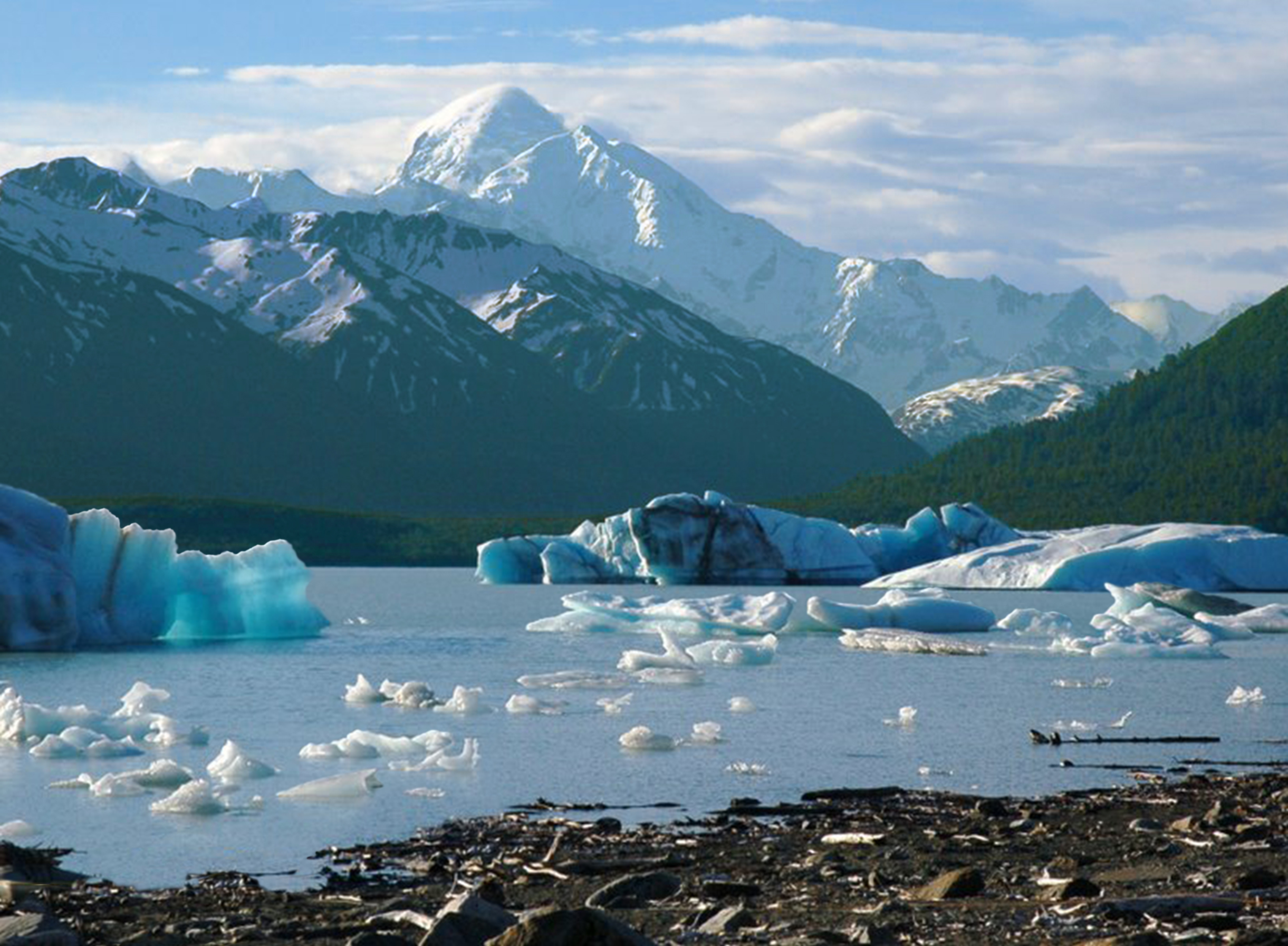 Der Alsek River durchfließt am Fuße des Mount Faiweather (4.663 m) den Alsek Lake (Alaska) und nagt an seinen Gletschern.